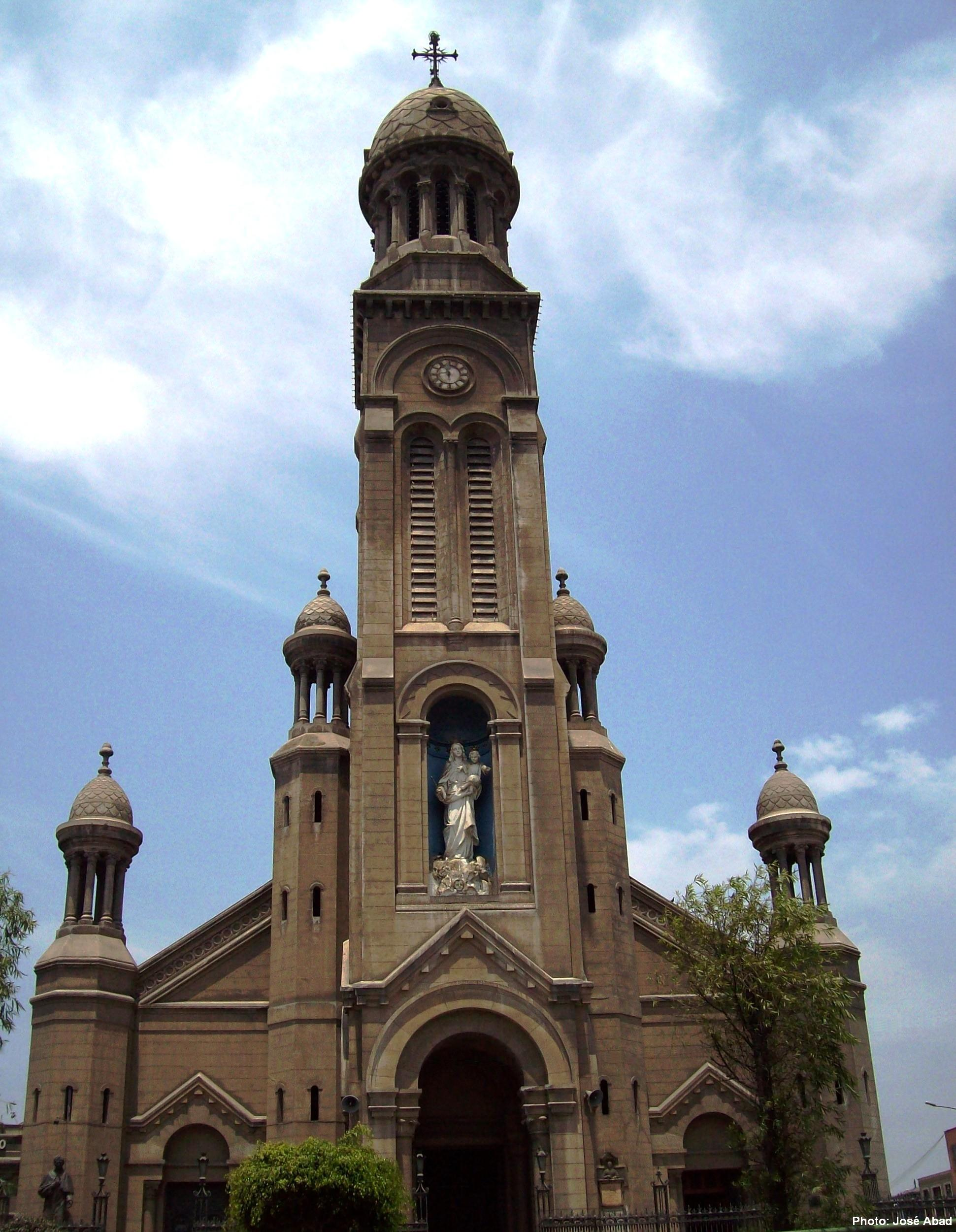 Basílica María Auxiliadora, perteneciente a la orden salesiana, que presenta varios estilos: torre neobizantina con elementos afrancesados y cobertura neorrománica.